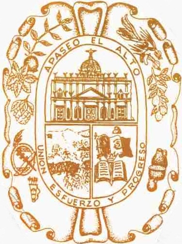 Escudo de Apaseo el Alto (Color Naranja)